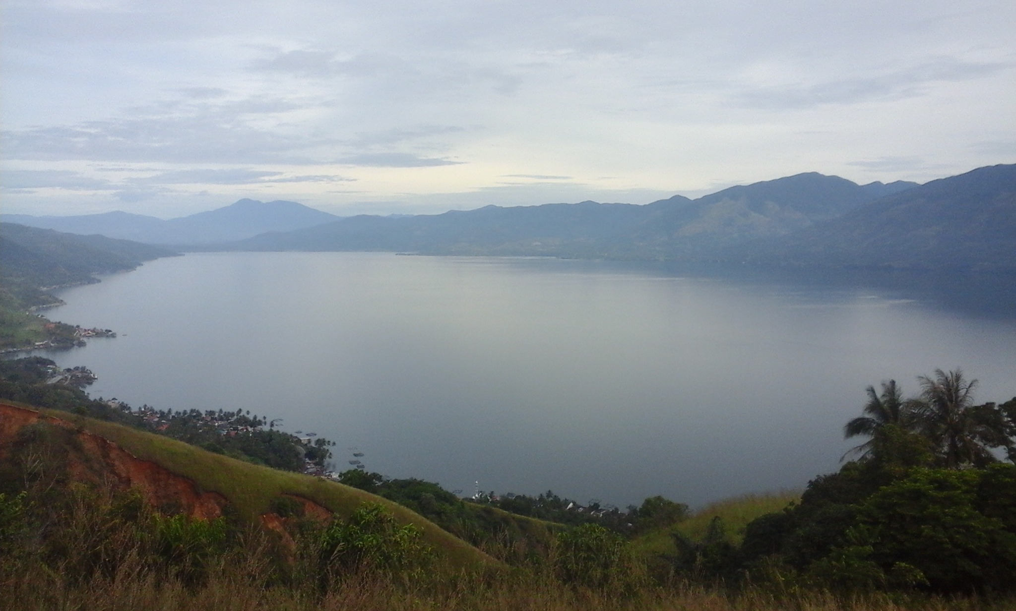 Pesona Alam Minangkabau